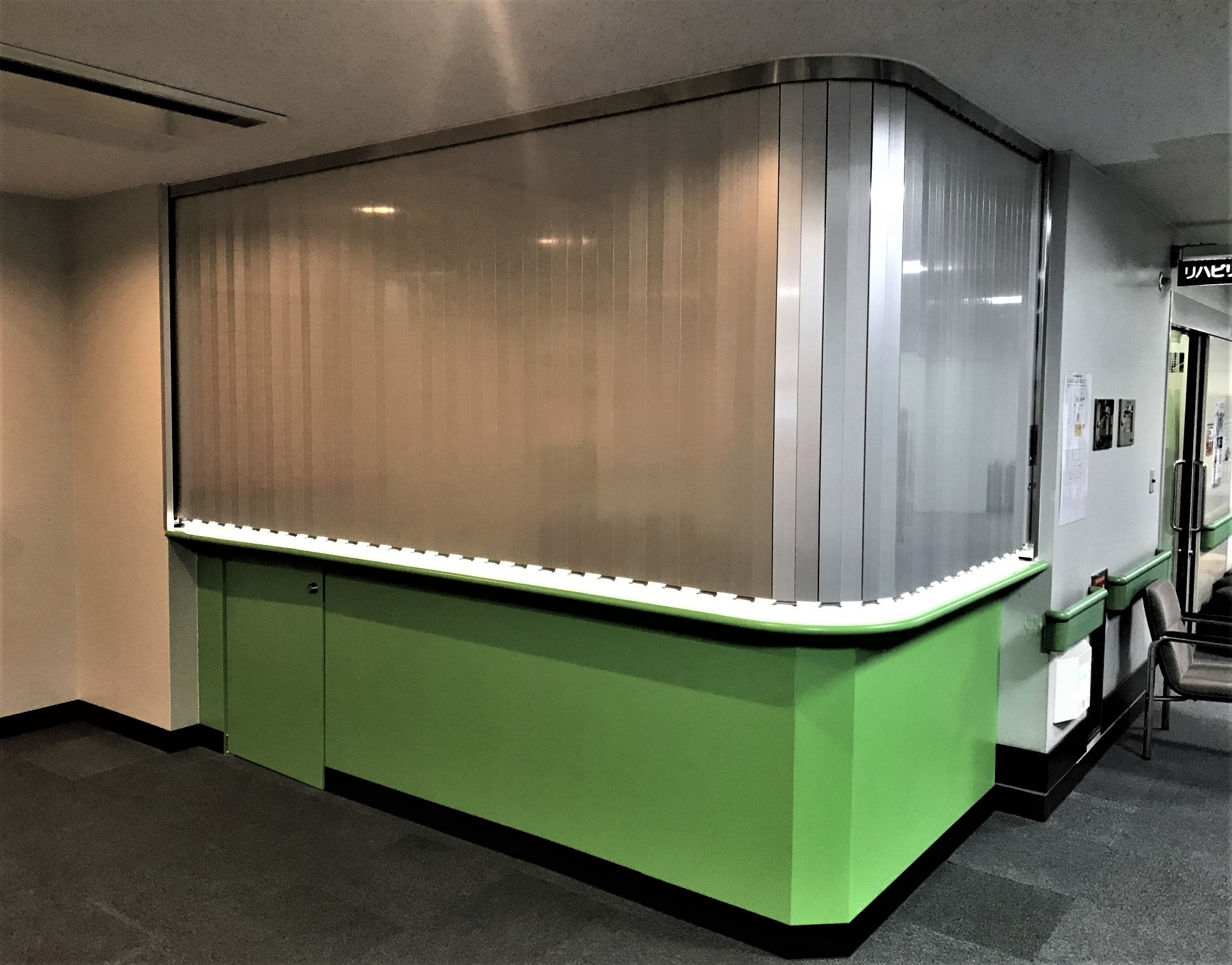 株式会社横引シャッター製品 川口市武南病院クリニック